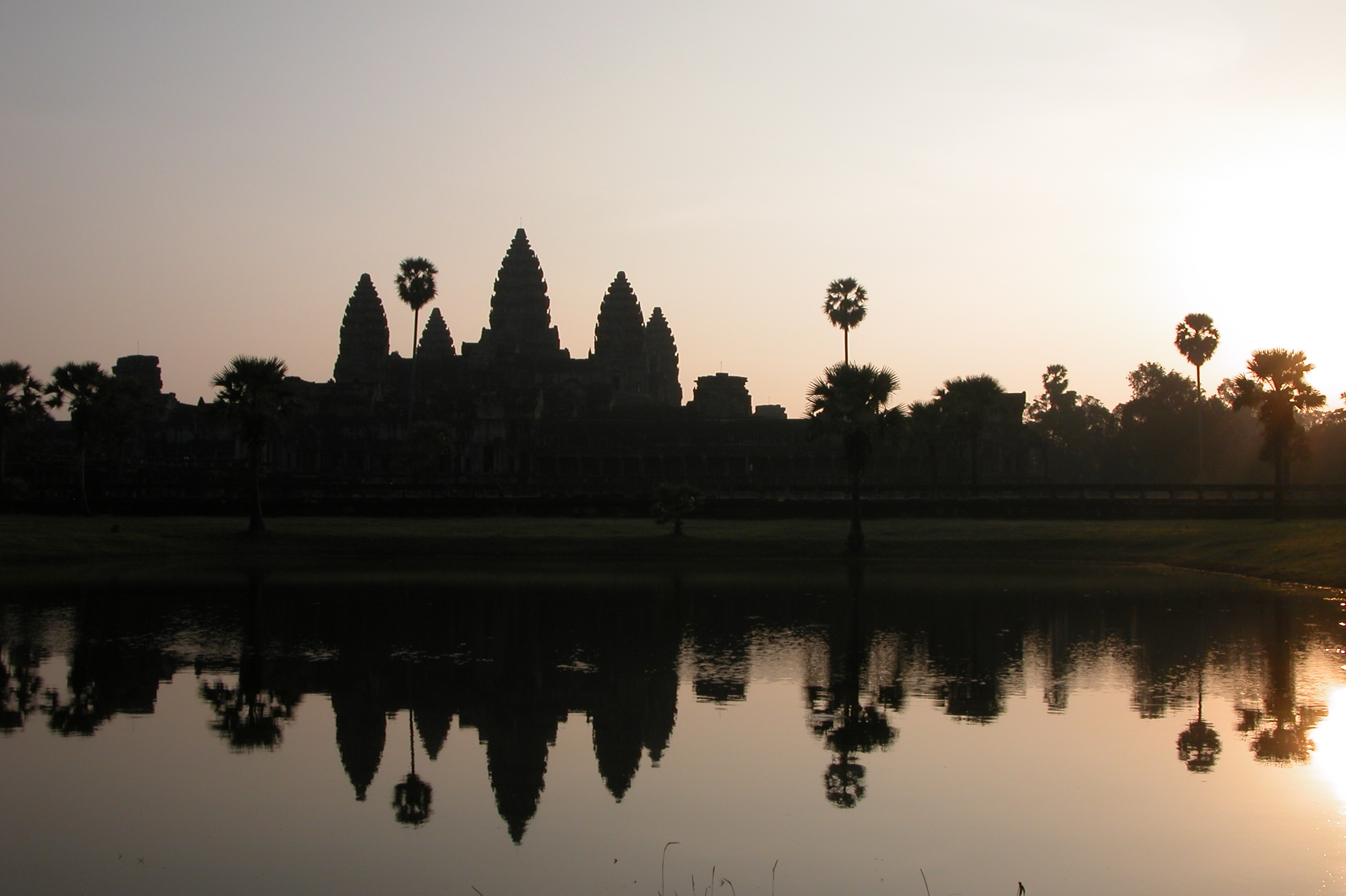 Angkor Wat, Cambodia at sunrise. Photo: Erik Hooymans